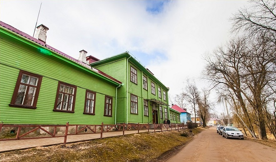 Petseri lingvistiline gümnaasium